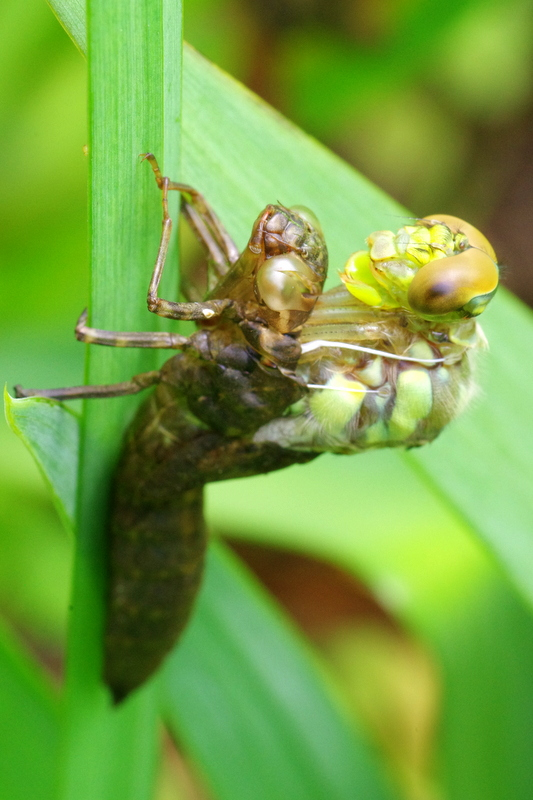 Żagnica sina (Aeshna cyanea) - przeobrażenie. Przez pęknięcie na grzbiecie wysuwa się głowa imago.